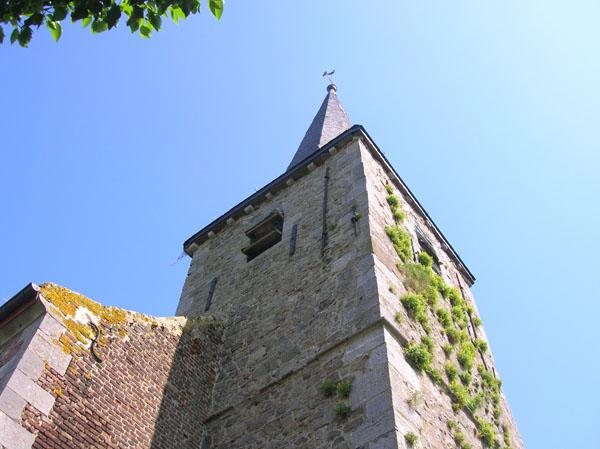 Vue du clocher de l'église de Croix-lez-Rouveroy